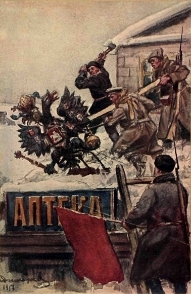 «Долой орла!». Обложка 14-го выпуска сборника «Великая война в образах и картинах».